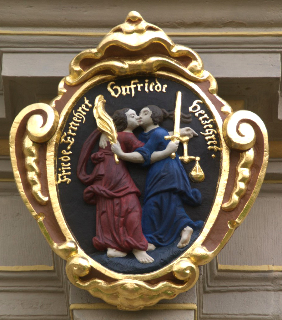 Friedenskuss-Darstellung am Nordportal von Schloss Friedenstein in Gotha.